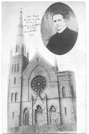 A Clevelandi Szent Imre római katolikus magyar templom és iskola képeslapon, 1915-20 között, a fényképen szereplő pap valószínűleg Rátz János